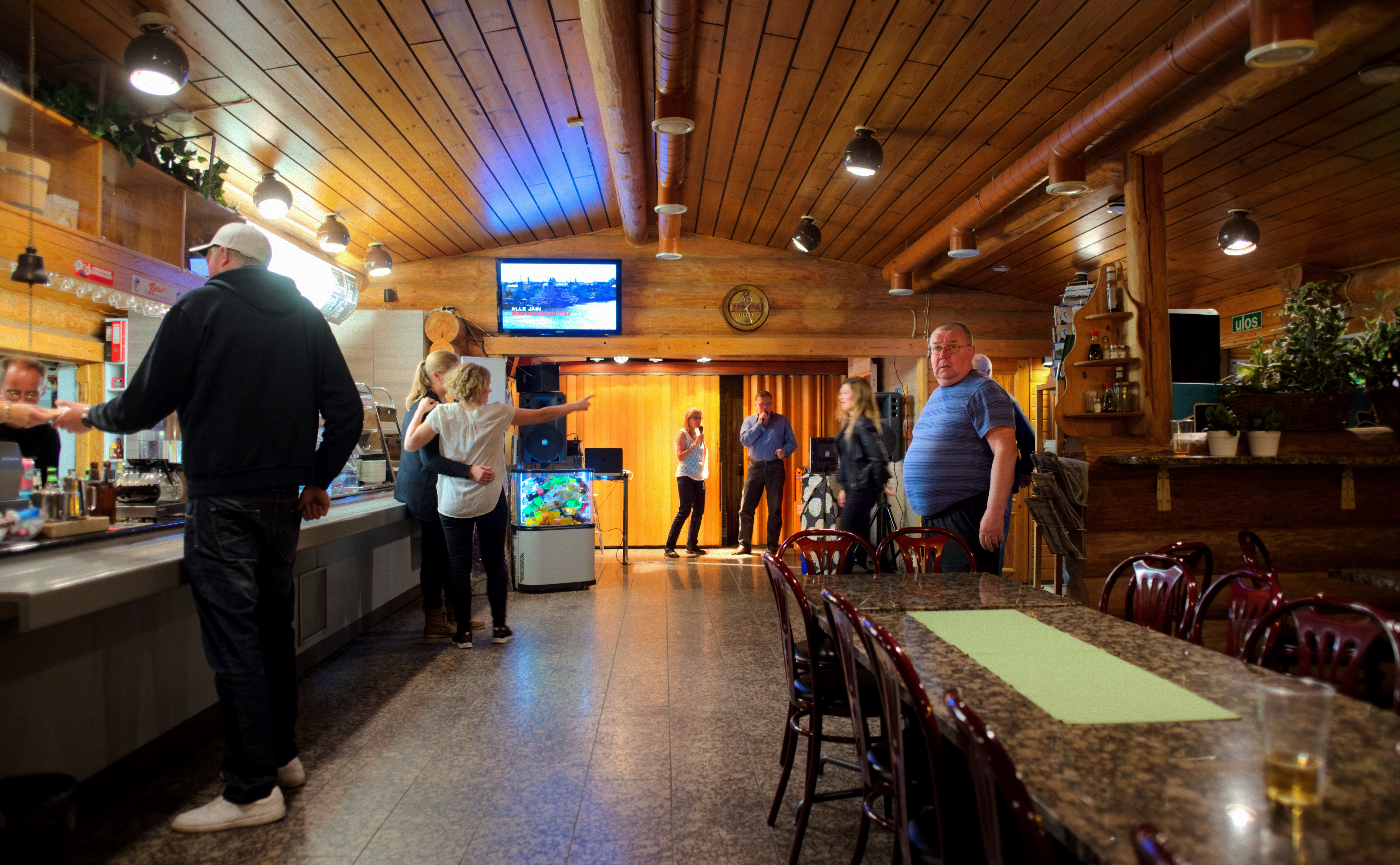 Karaokea ylämaalaisessa ravintolassa 9.9.2017